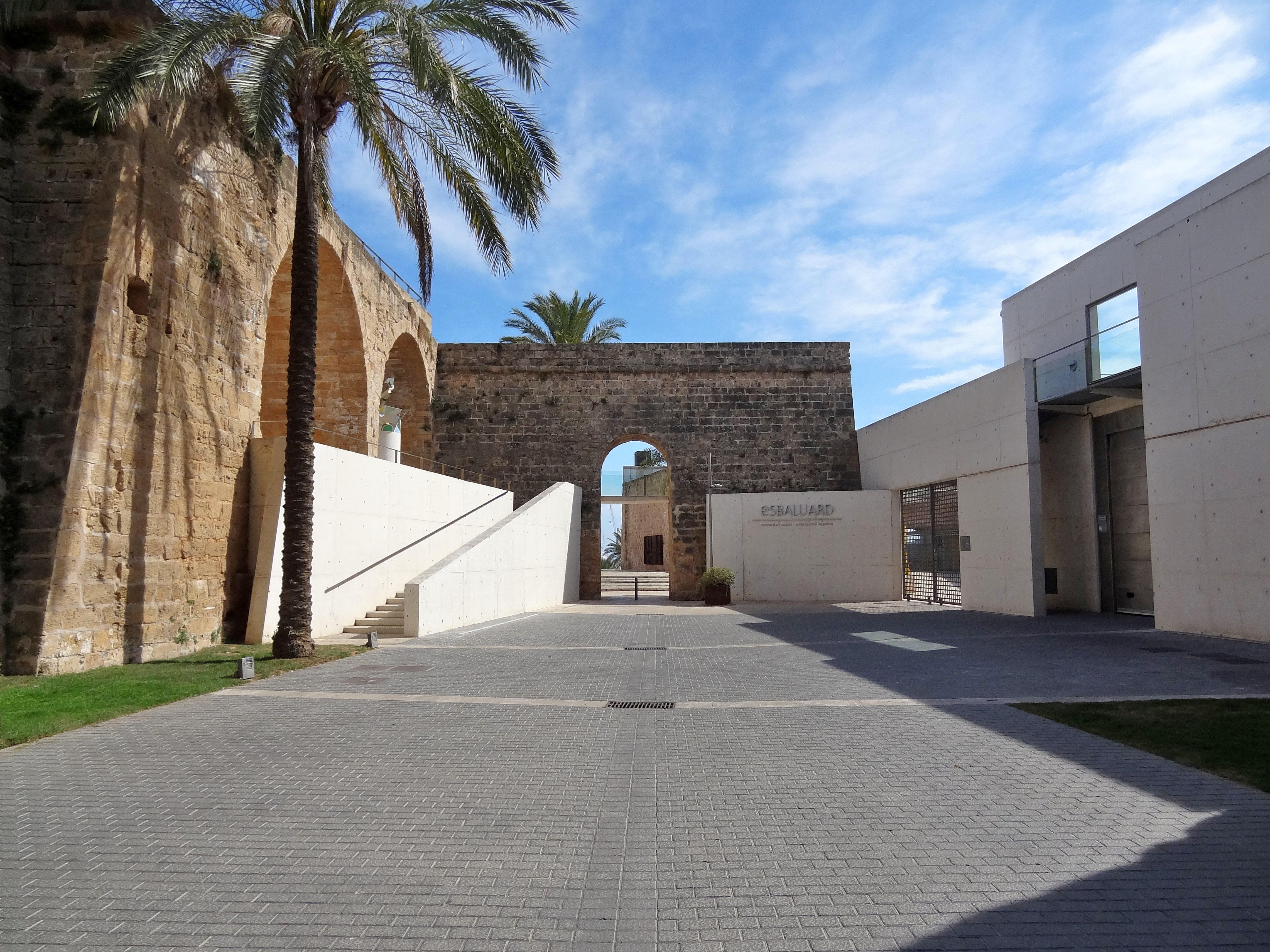 Es Baluard, Museum für moderne und zeitgenössische Kunst in Palma, Mallorca, Spanien